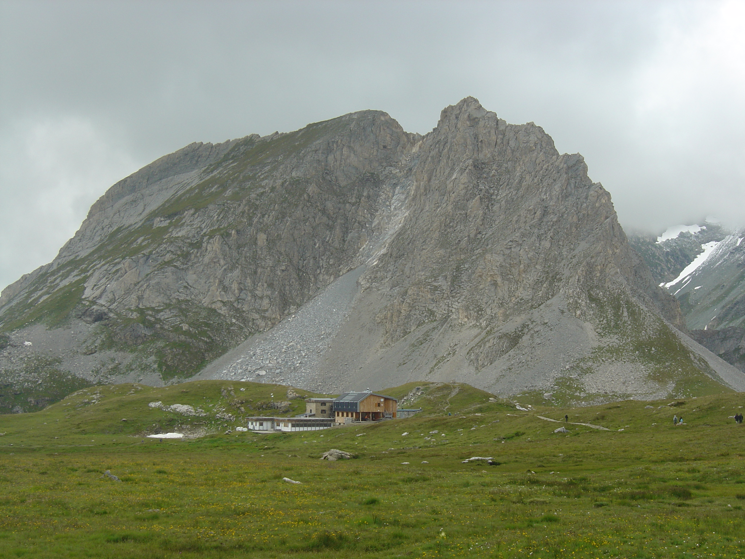 L’aiguille de la Vanoise (2796m) surplombant le col de la Vanoise